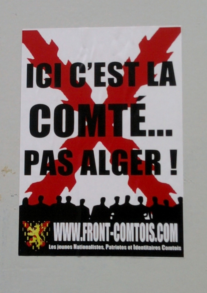 Affichette « ici c'est la Comté, pas Alger » du Front Comtois, collée sur un mur de Besançon (Doubs, France).